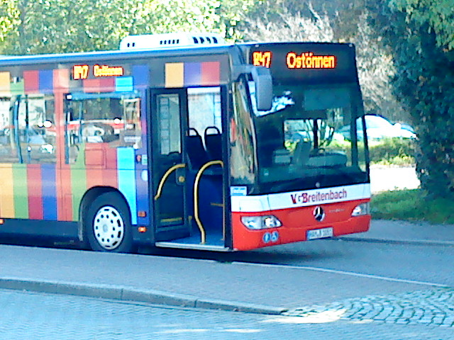 Wagen 51 der Verkehrsgesellschaft Breitenbach am Werl Bhf